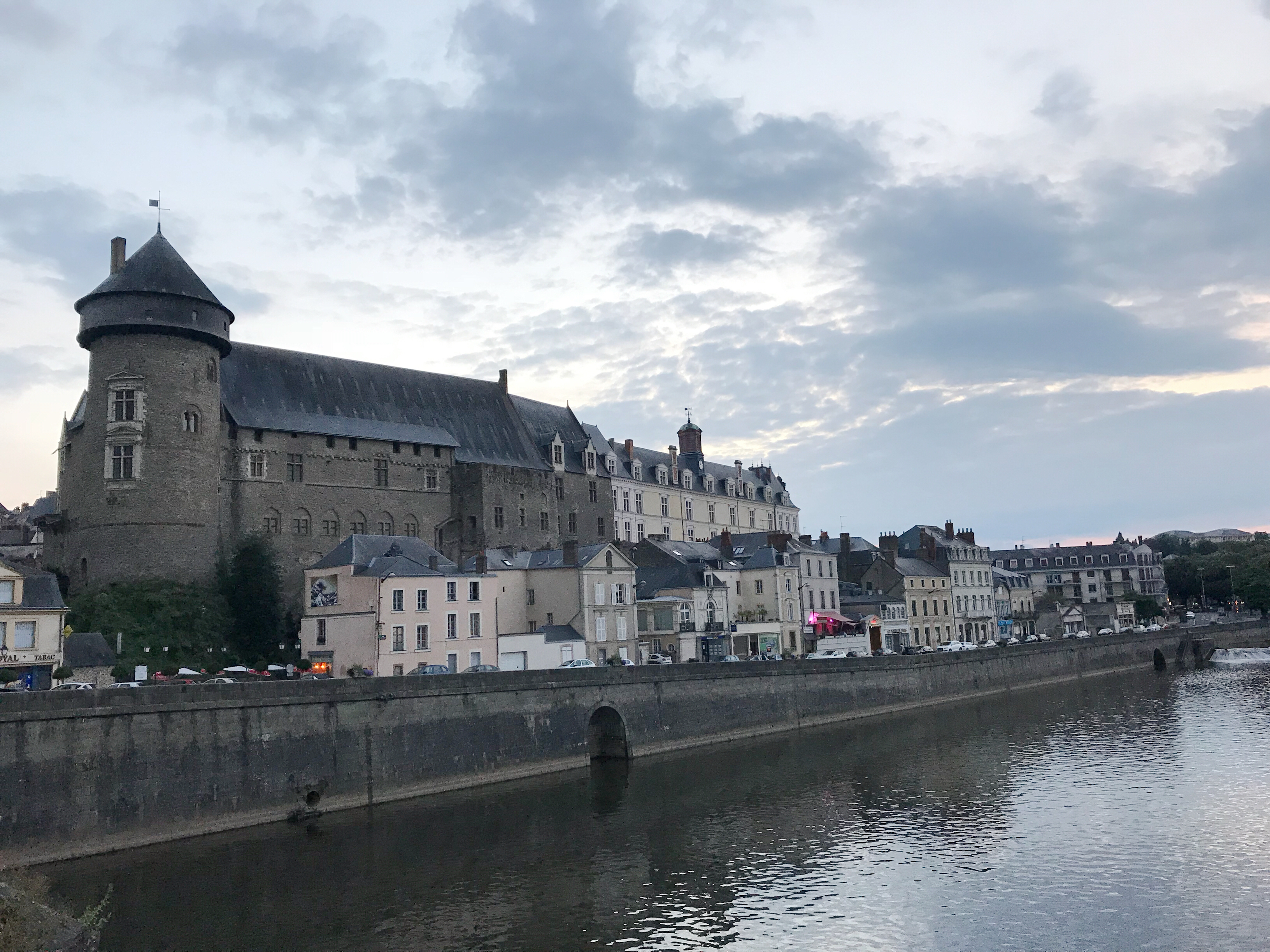 Château de Laval en 2018